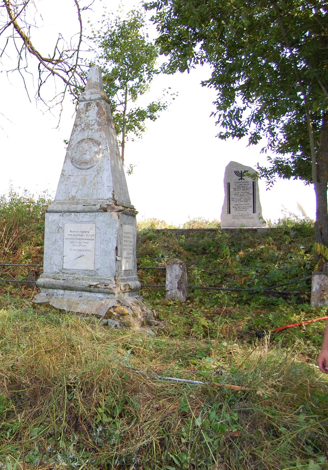 Старый основной памятник убитым евреям Яновичского гетто у деревни Зайцево возле зернотока.